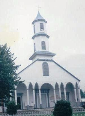 Autor: Roberto Bahamonde Lugar: Dalcahue, Chiloé, Chile